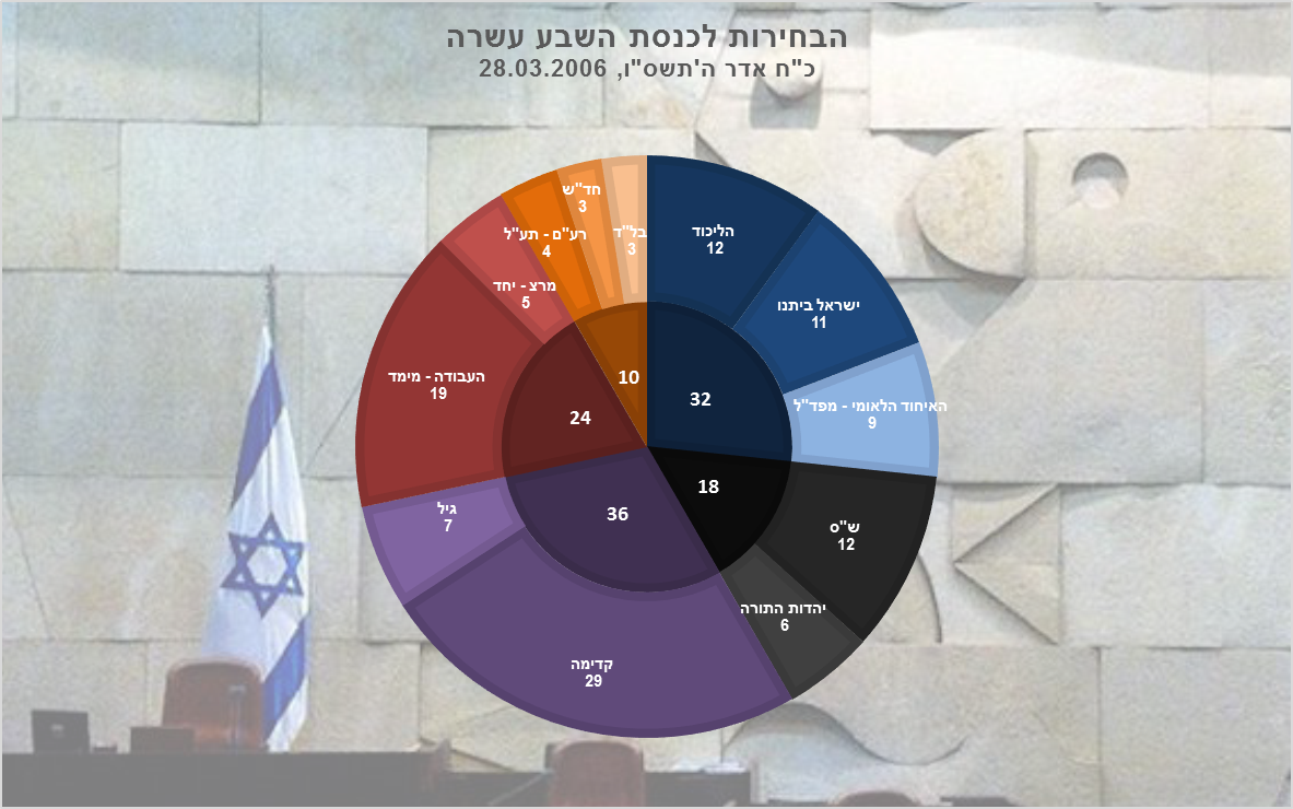 תוצאות הבחירות לכנסת השבע עשרה